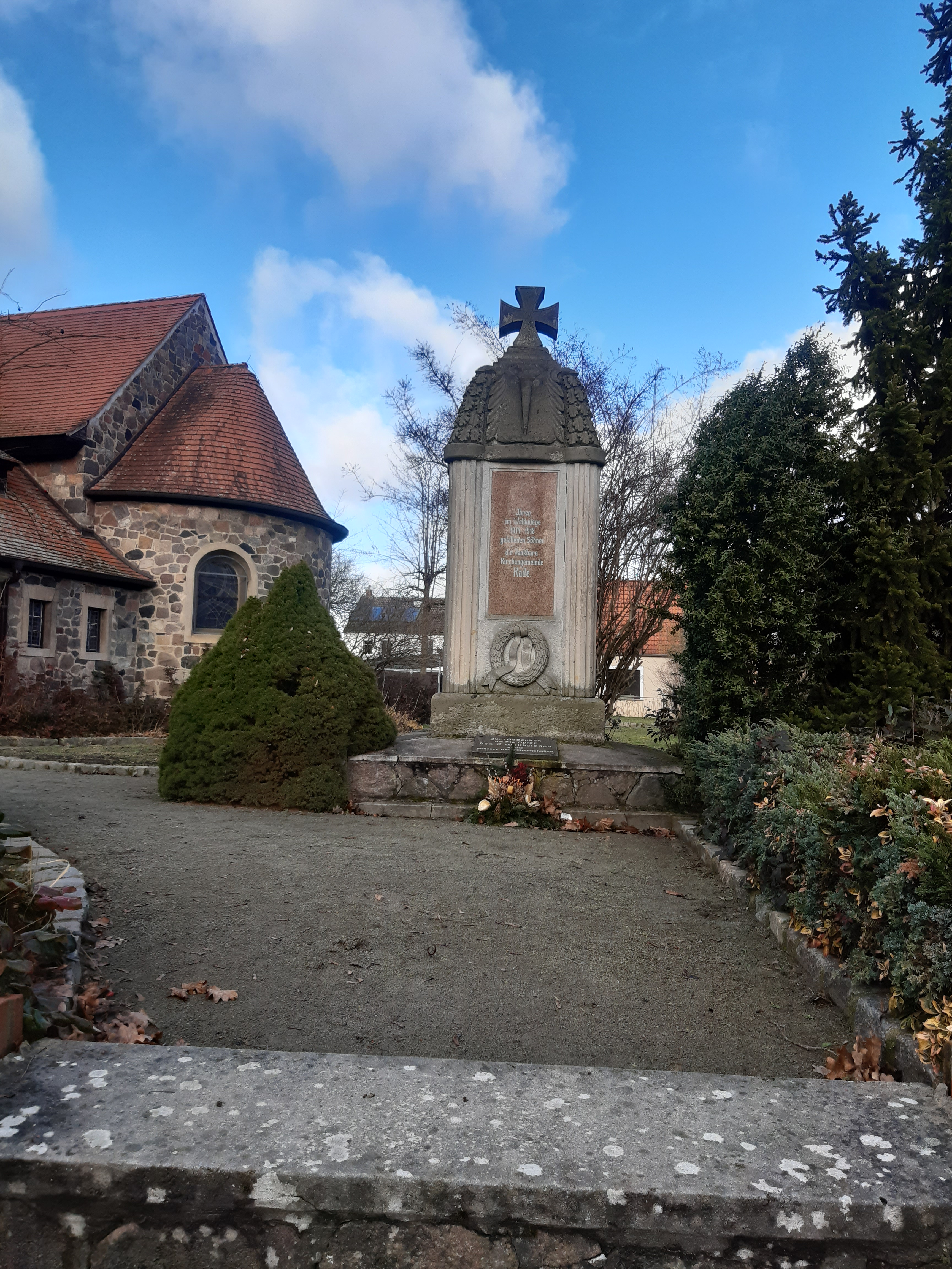 Kriegerdenkmal